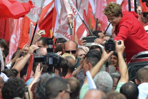 A presidenta Dilma Rousseff, candidata à reeleição, participa de caminhada no centro de Porto Alegre, véspera do segundo turno das eleições.